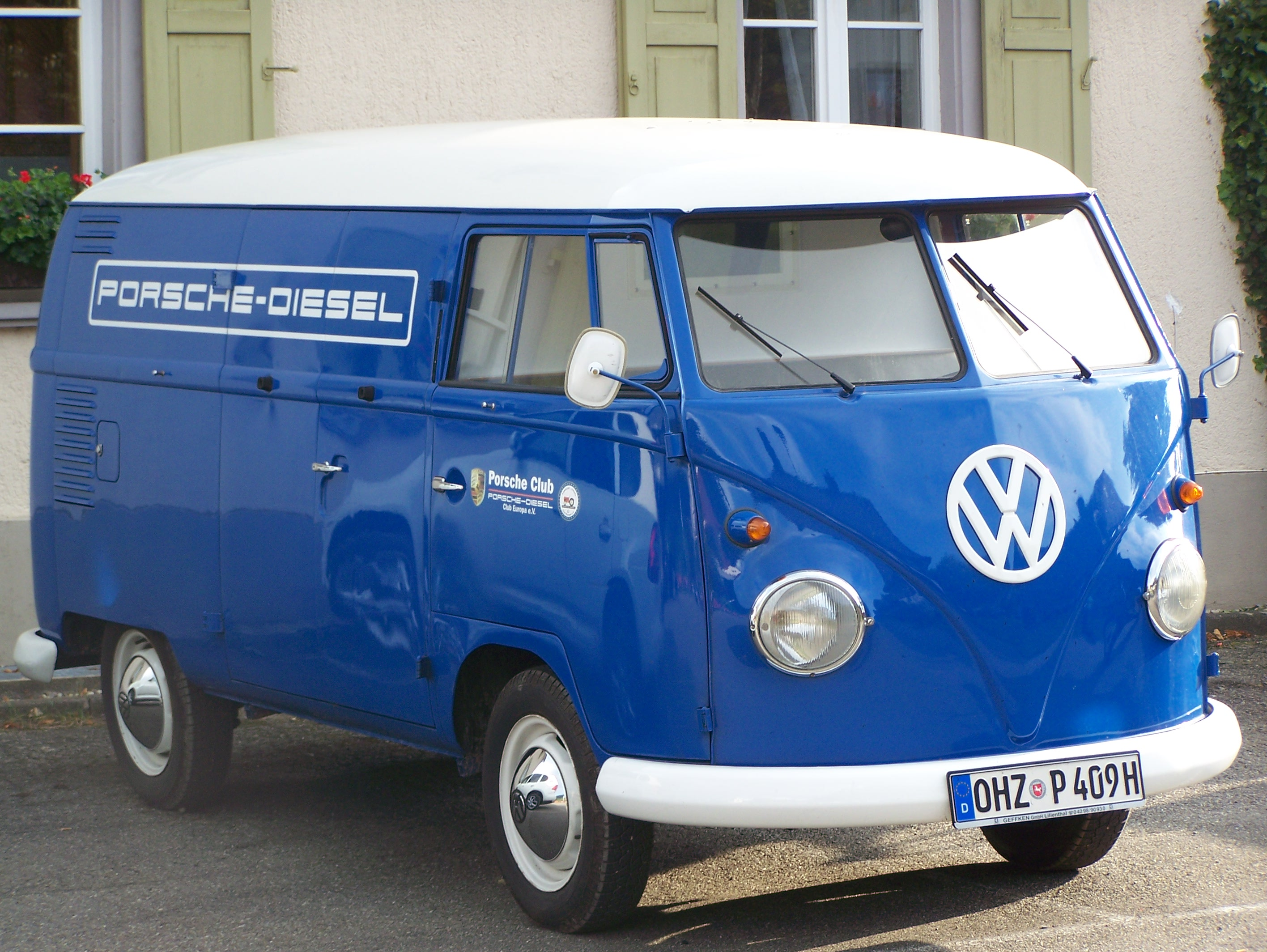 aufgenommen beim Porsche-Oldtimer-Treffen in Saig, Lenzkirch, Baden-Wüttemberg, Deutschland.